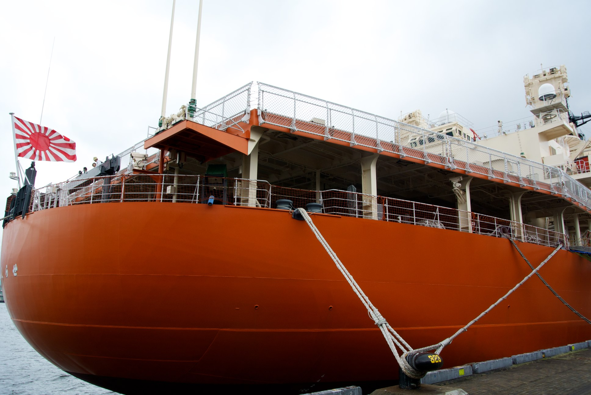 南極観測船しらせ。横浜・大桟橋で一般公開中。